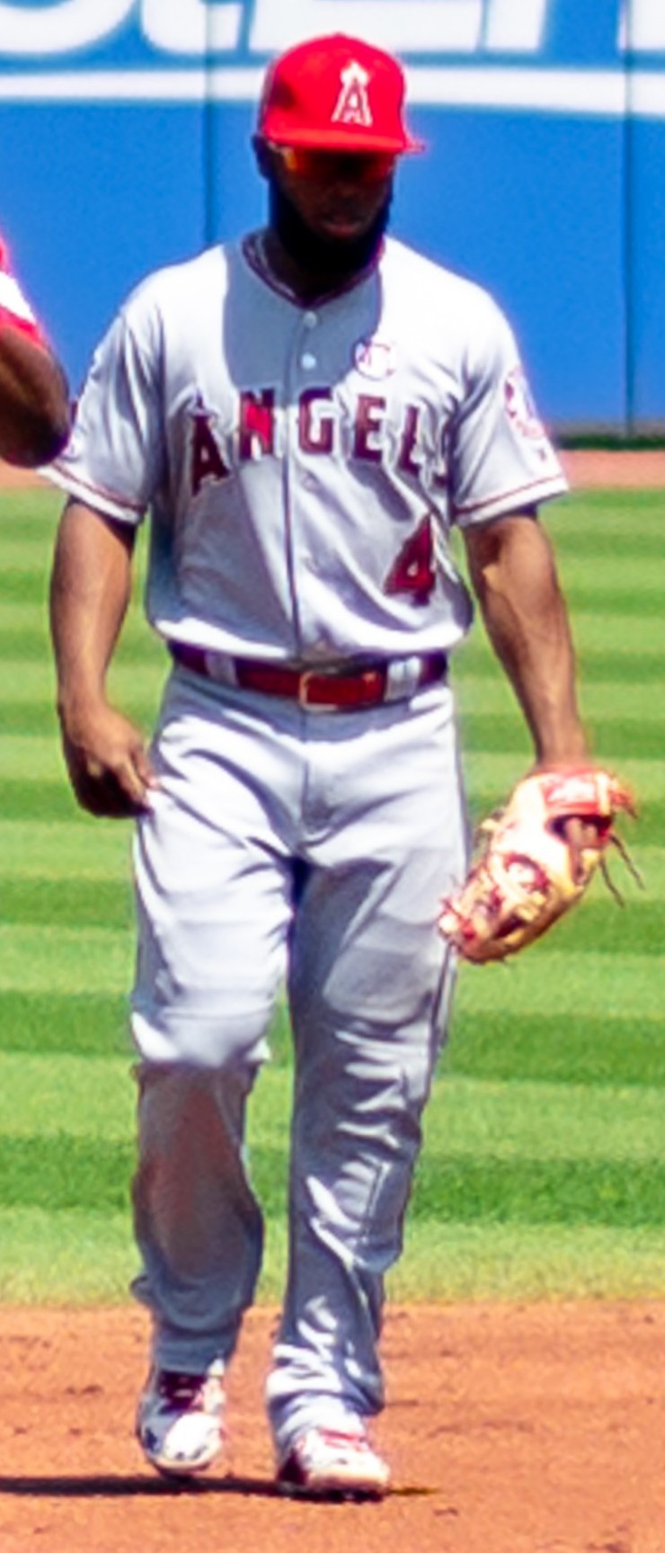 Los Angeles Angels VS. Cleveland Indians